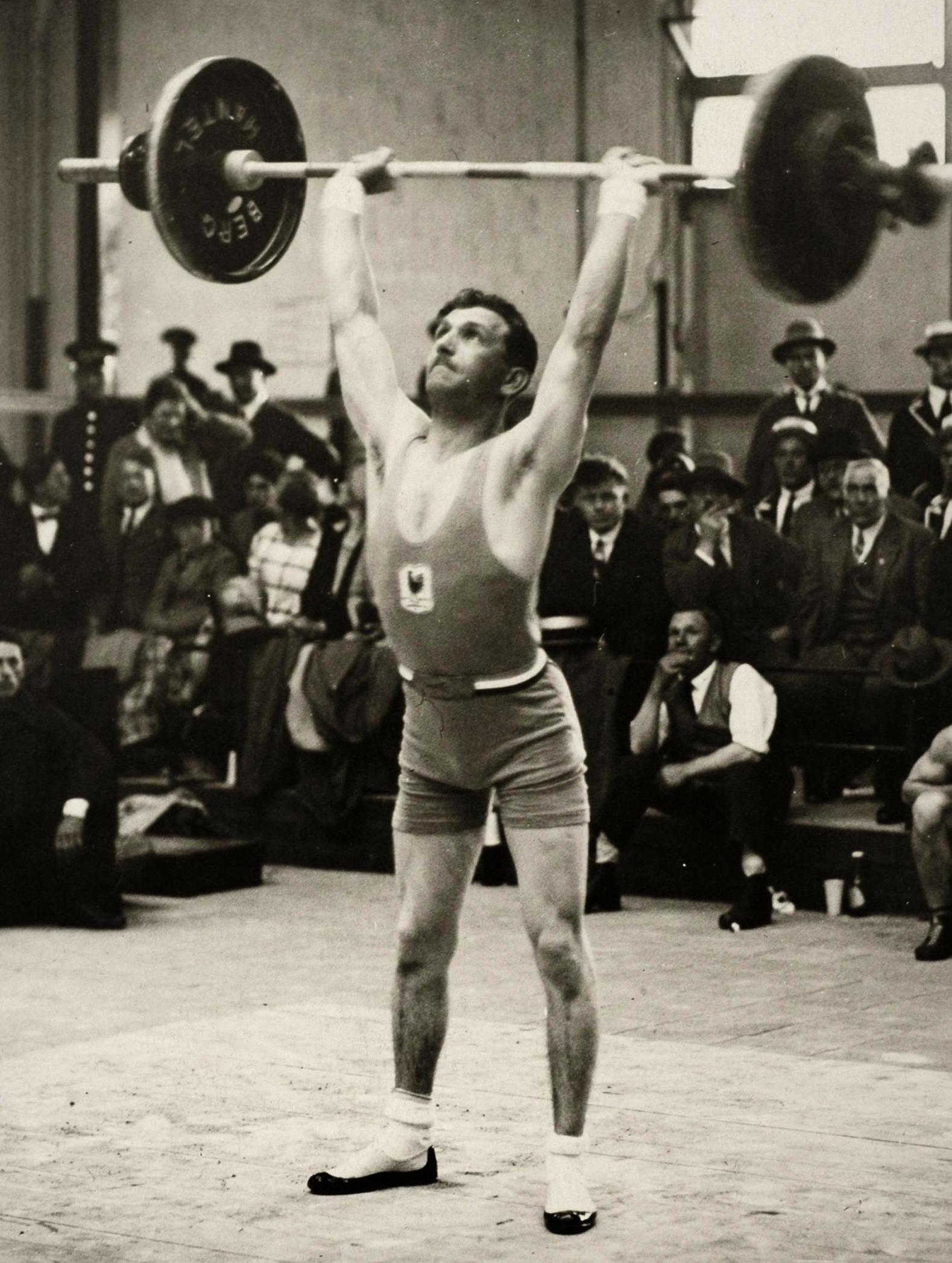 Sport. Sport, Olympische Spelen 1928, Amsterdam : De Fransman Jules Meese in actie tijdens het gewichtheffen.